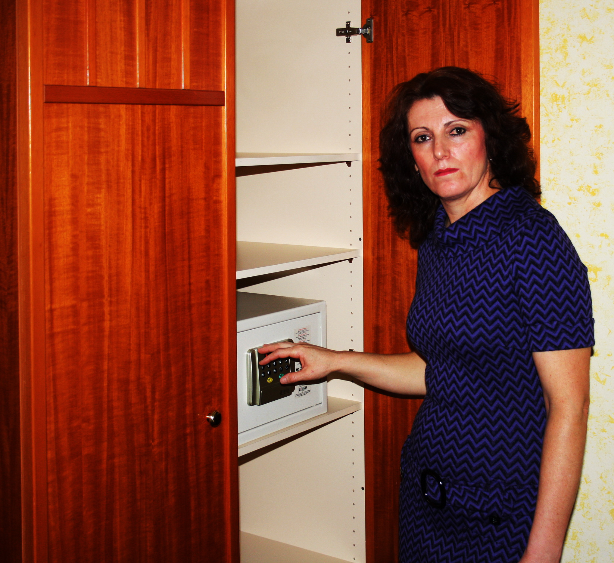 Möbeltresor mit elektronischem Zahlenschloss in einem Hotelzimmer.